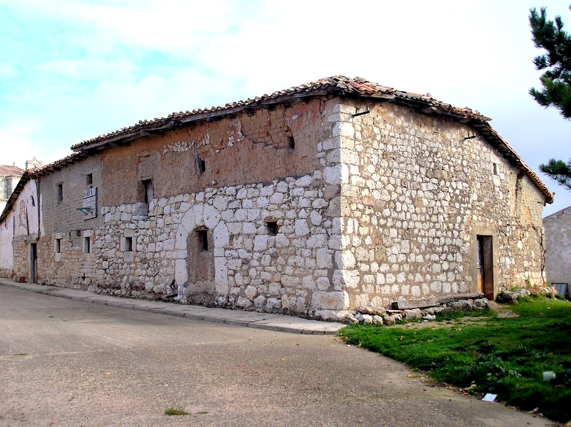 Casa de Villusto (Burgos, España), un tipo de casa frecuente en la comarca, con piedra, adobe y un arco de medio punto en la puerta.